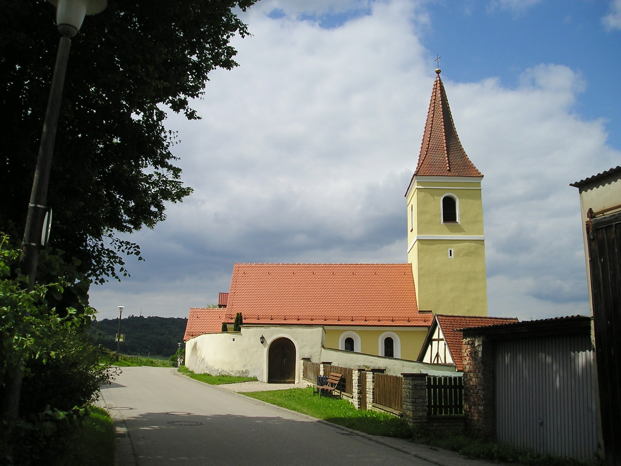 Ilbling_im_Landkreis_Eichstätt,_Kirche_außen